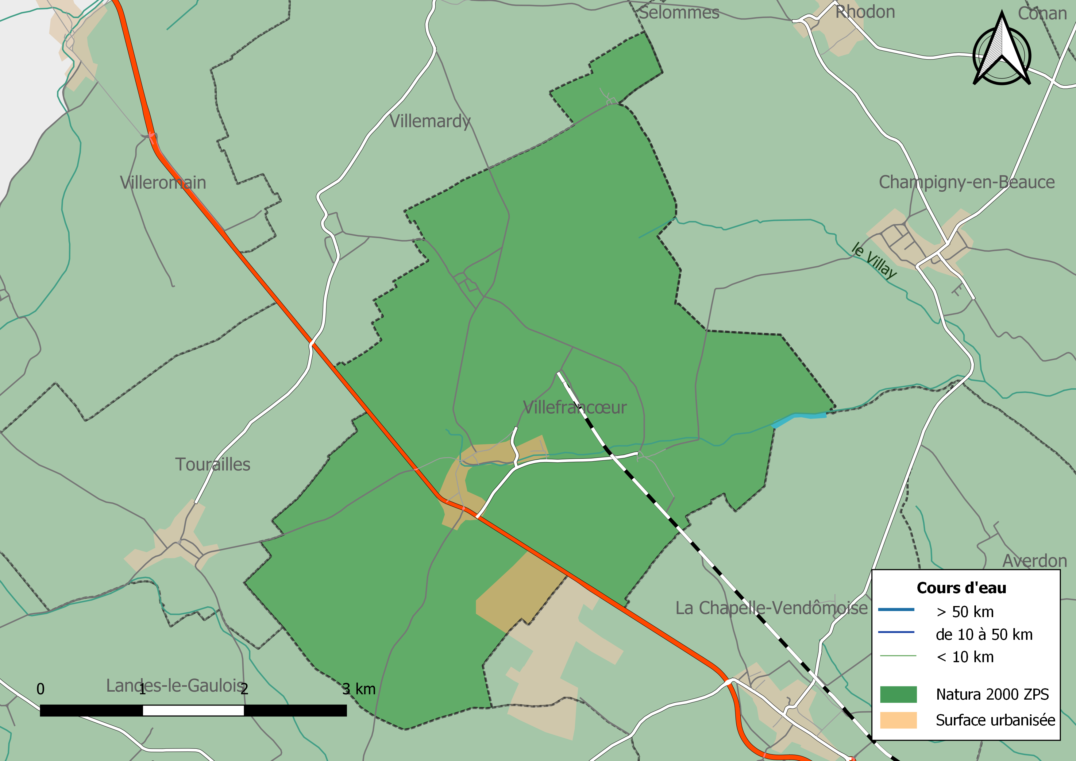 Carte du site Natura 2000 de type ZPS de la commune de Villefrancœur (France).